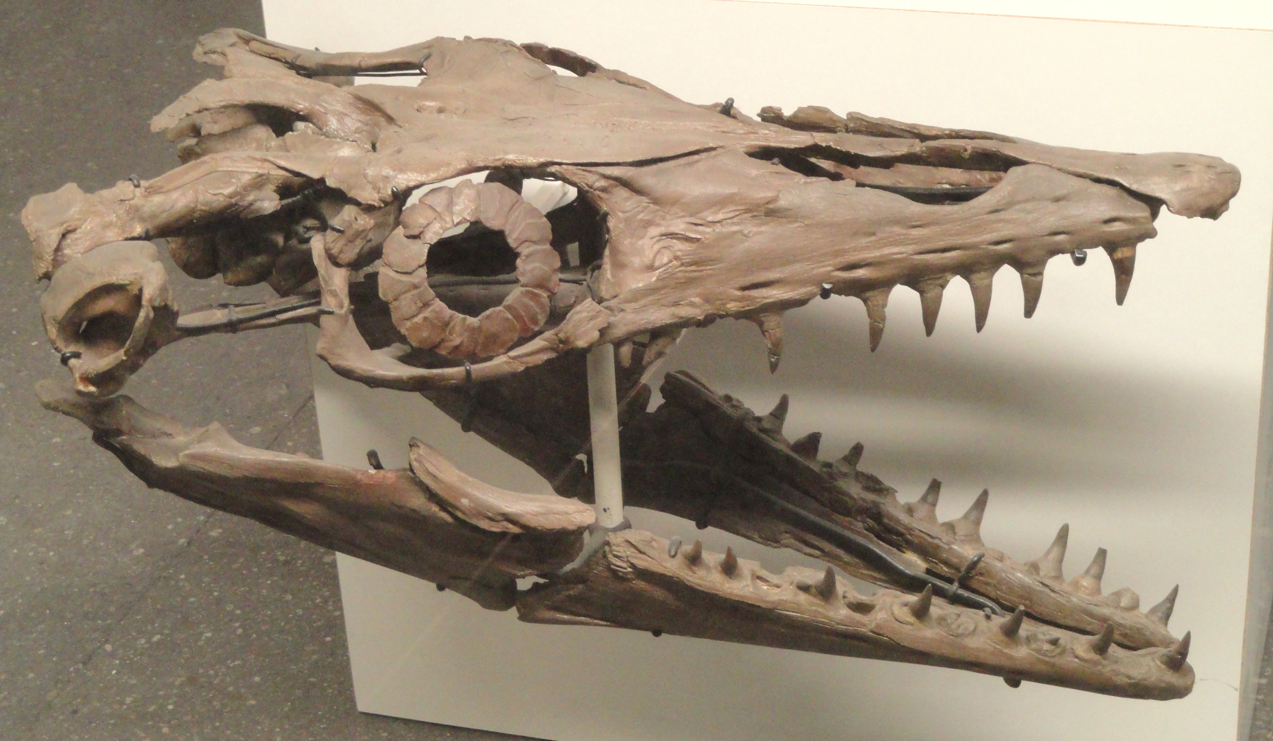 Exhibit in Naturmuseum Senckenberg, Frankfurt am Main, Germany.